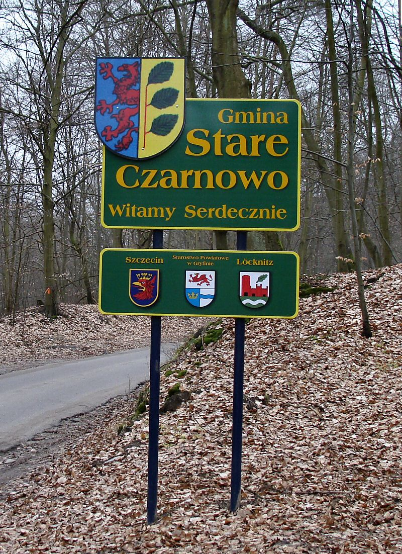 Gmina Stare Czarnowo - "witacz"